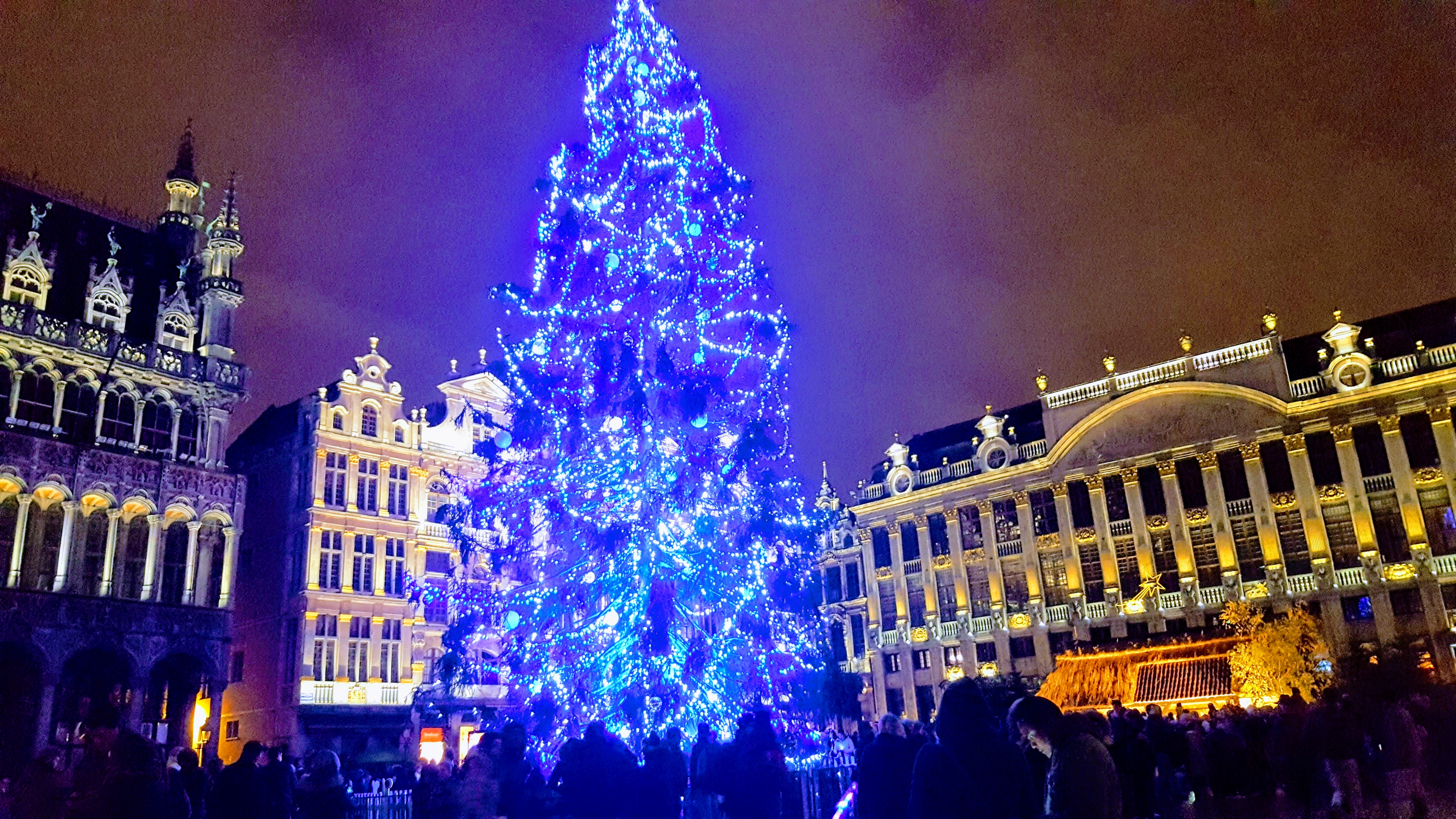 Crainn nollaig sa Grand Place, an Bhruiséil